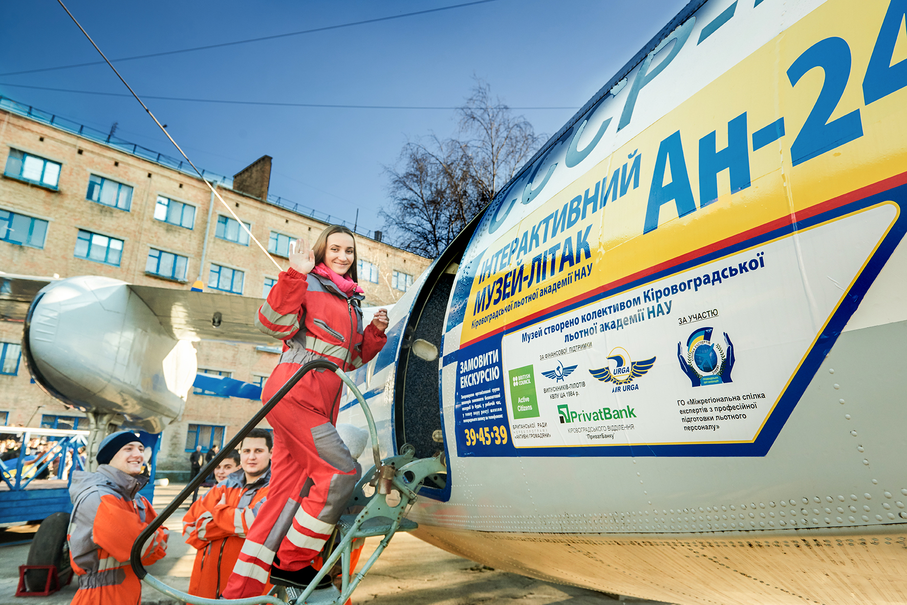 Літак-музей у Кіровограді, створений за програмою "Активні громадяни", фото - Ігор Демчук